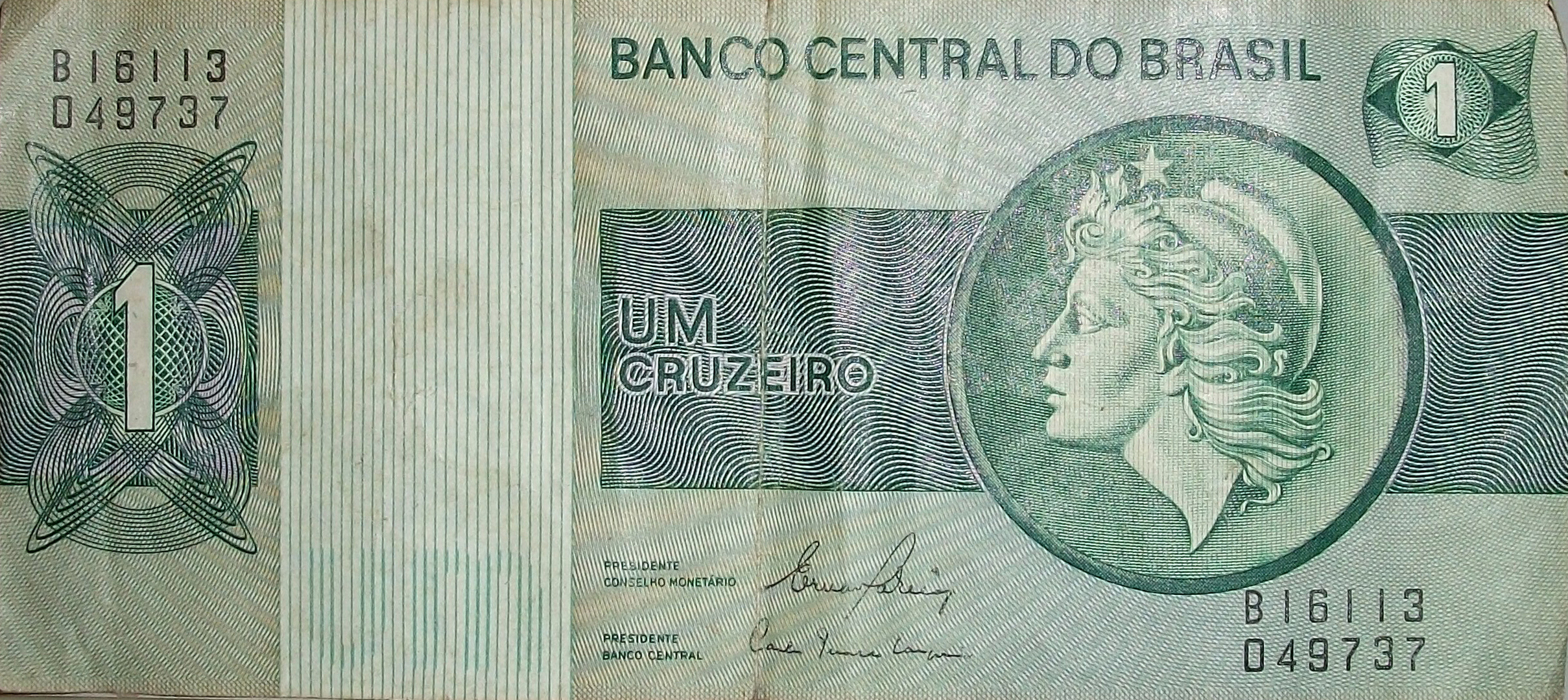 Anverso Cruzeiro (Cr$) vigente de 15.5.1970 a 27.2.1986. Descrição no Banco Central do Brasil